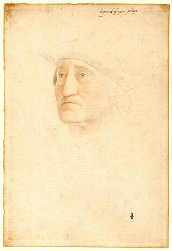 Protrait de Galiot de Genouillac(école de Clouet)